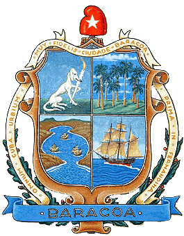 Icono del escudo de armas de Baracoa.